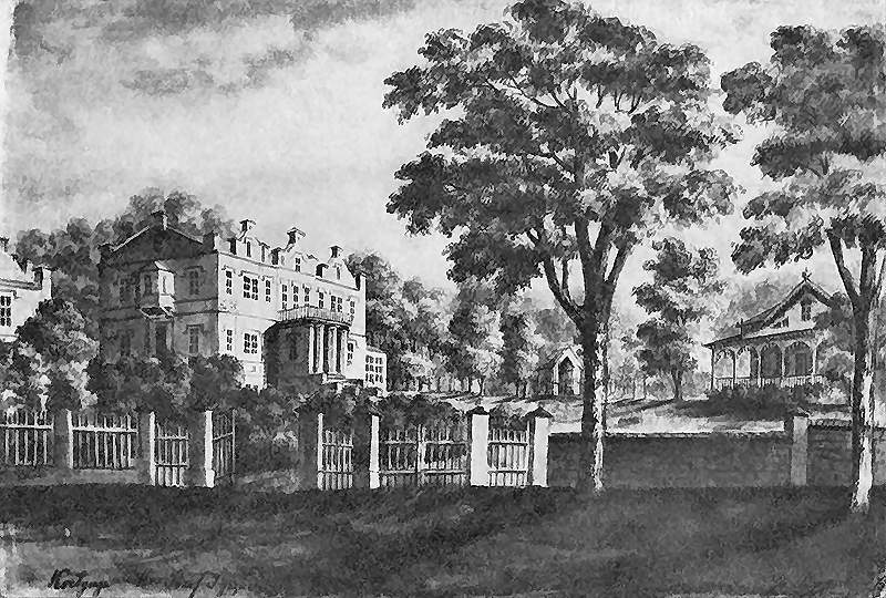 .Tiškevičiai Palace in Kretinga, Lithuania 19th century